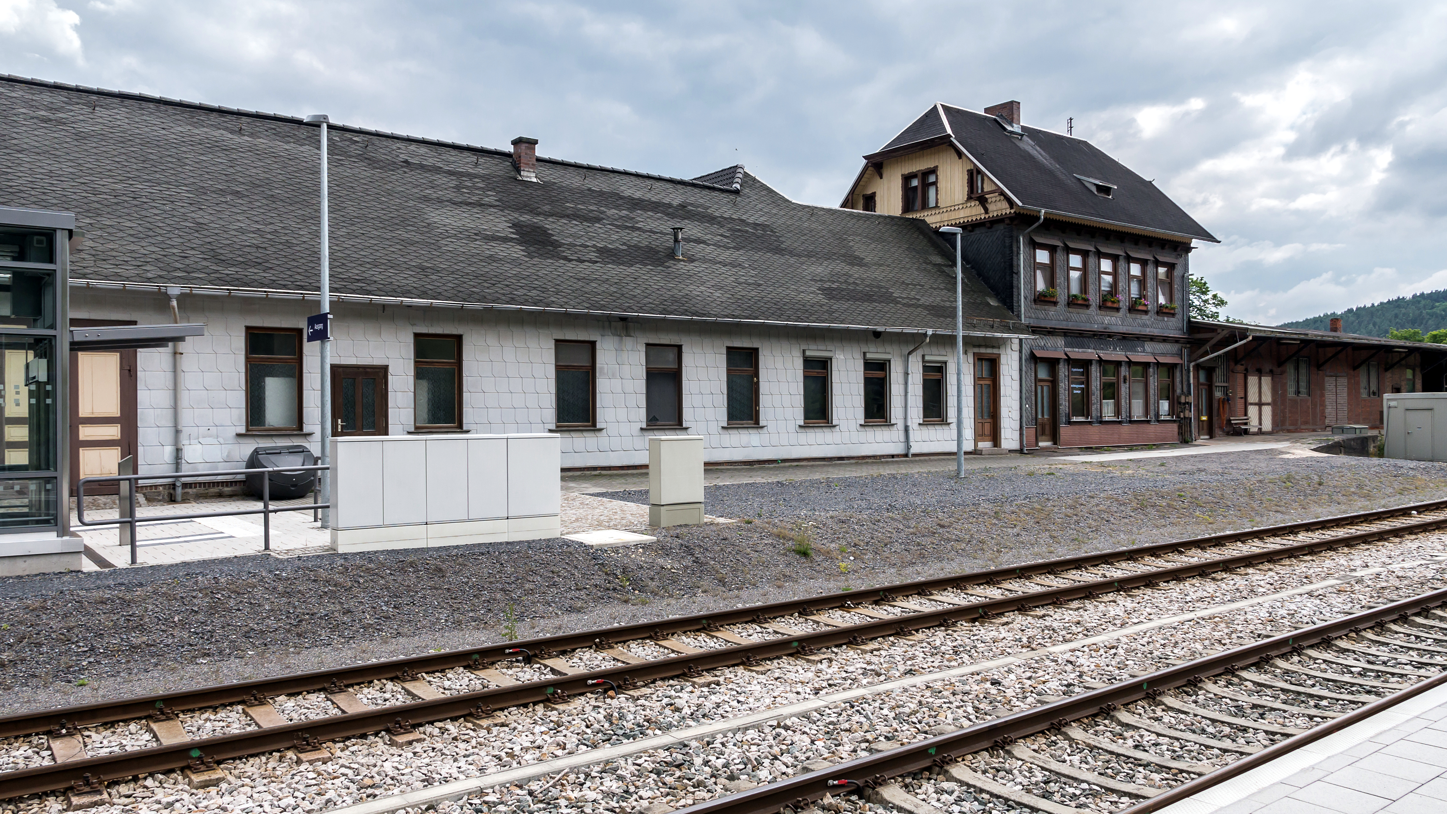 Bahnhof Rottenbach / Bestandteil der Sachgesamtheit "Oberweißbacher Berg- und Schwarzatalbahn",Am Bahnhof 3